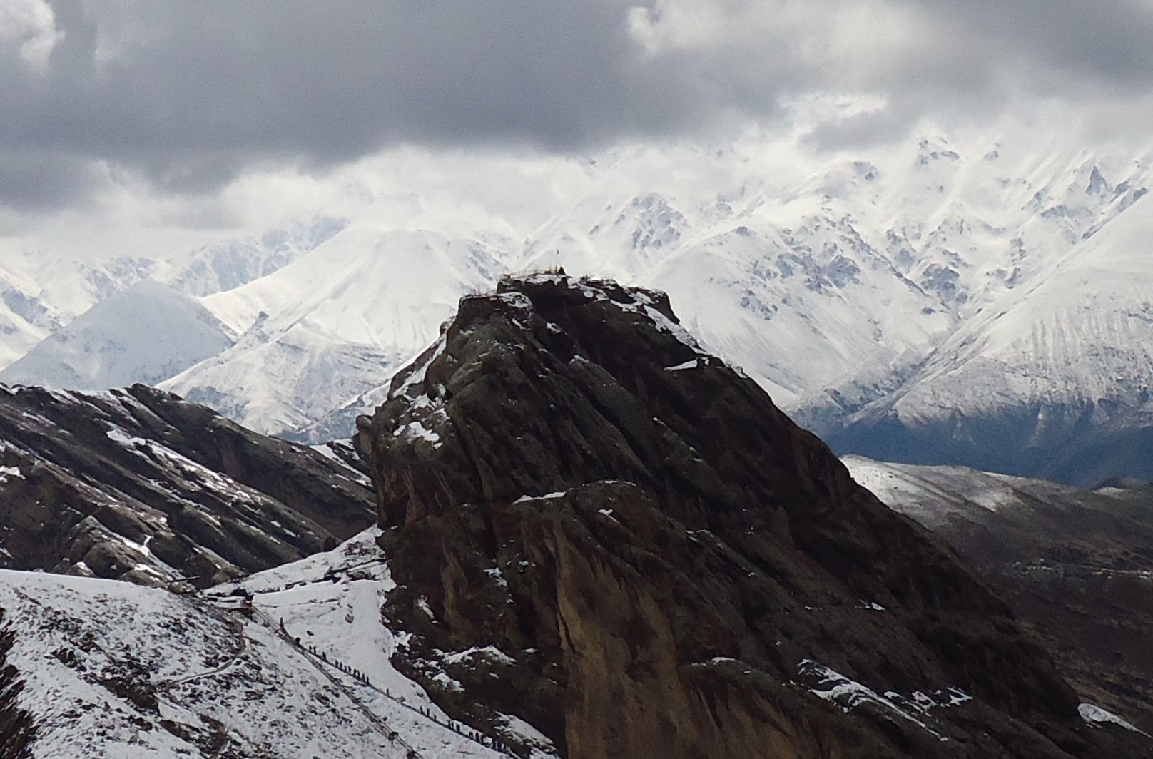 Les ruines d'un des châteaux de la secte Assassins dans la vallée d'Alamut